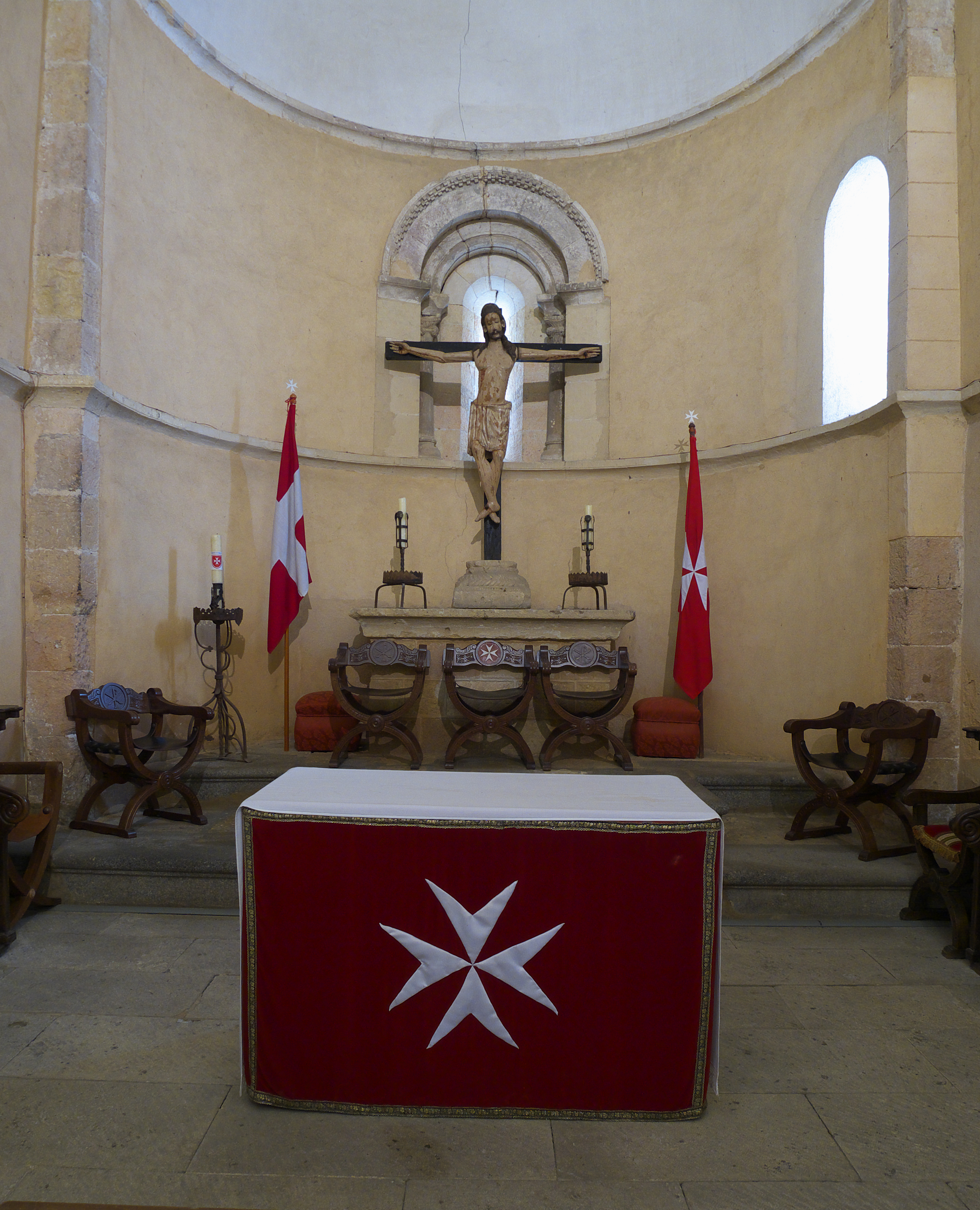 Presbiterio de la iglesia. El crucificado, esculpido en el siglo XIII.